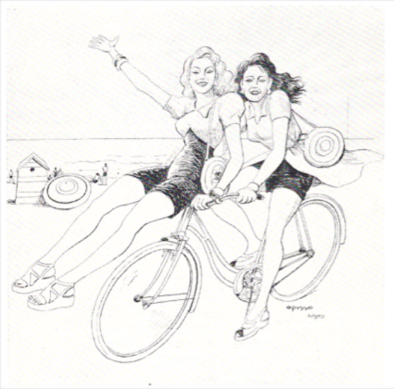 Etapa 1942-1965